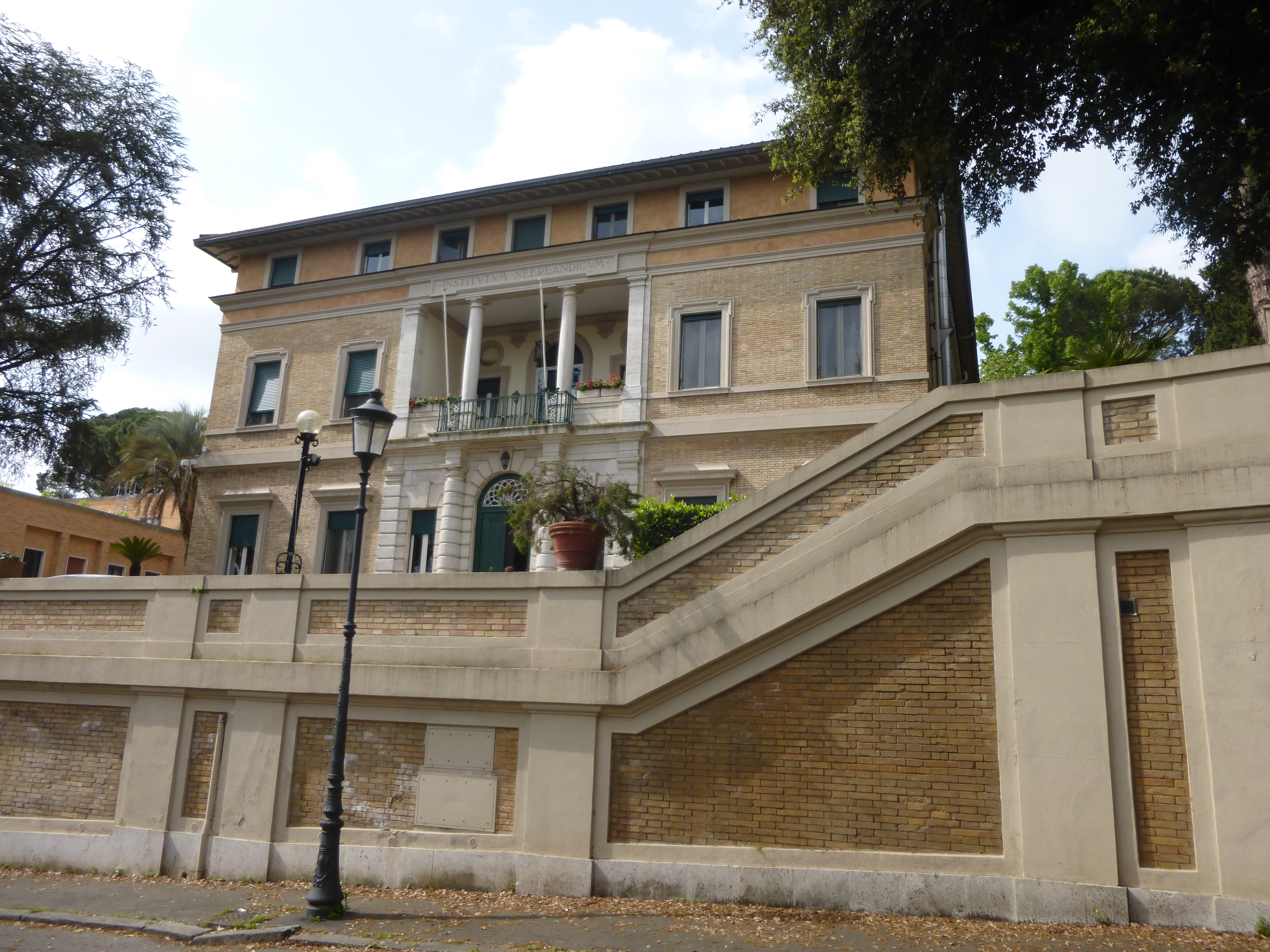 Roma, Institutum Nederlandicum (Accademia d'Olanda), via Omero.